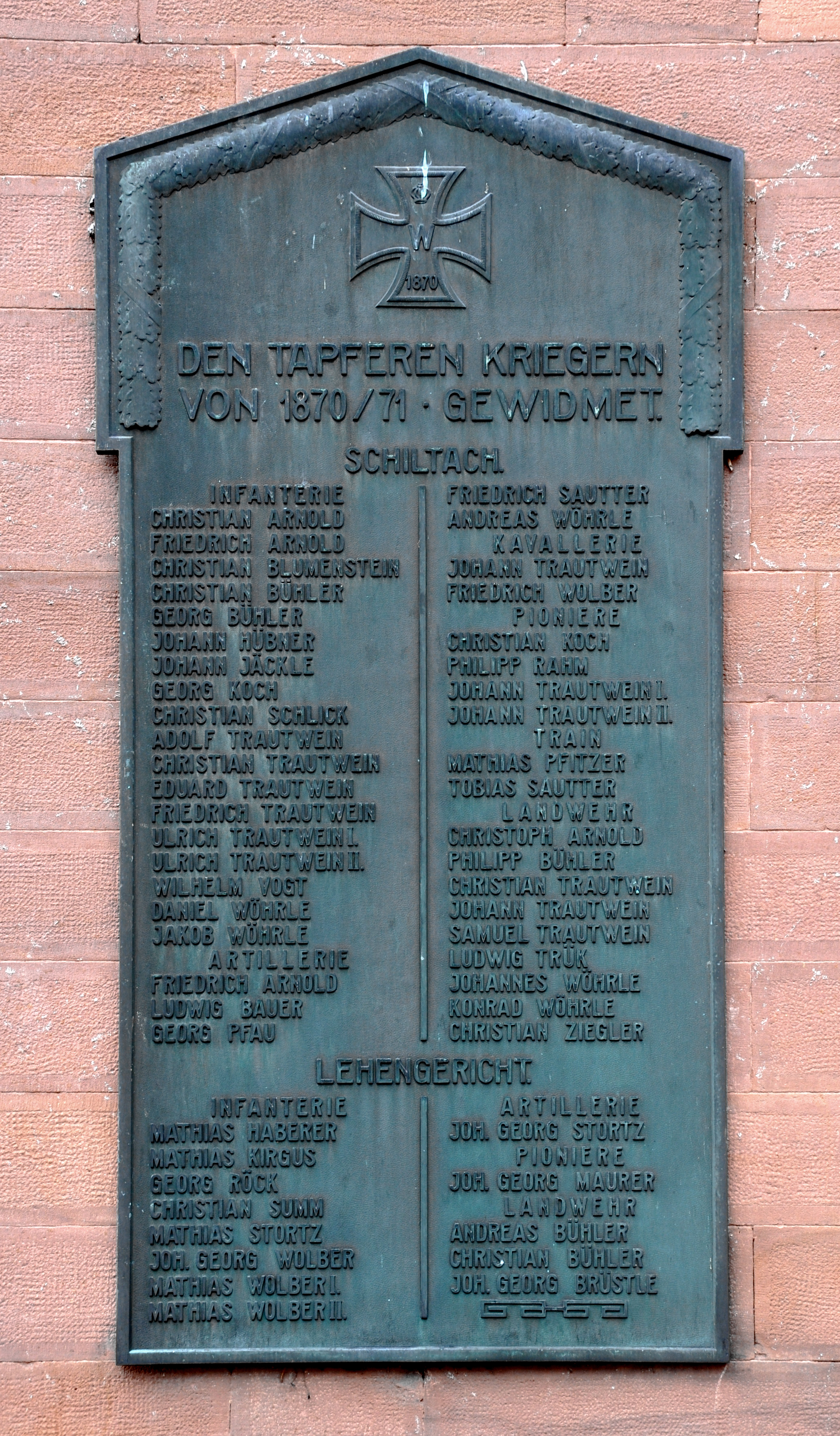 Schiltach, Stadtkirche, Kriegerdenkmal 1870/71